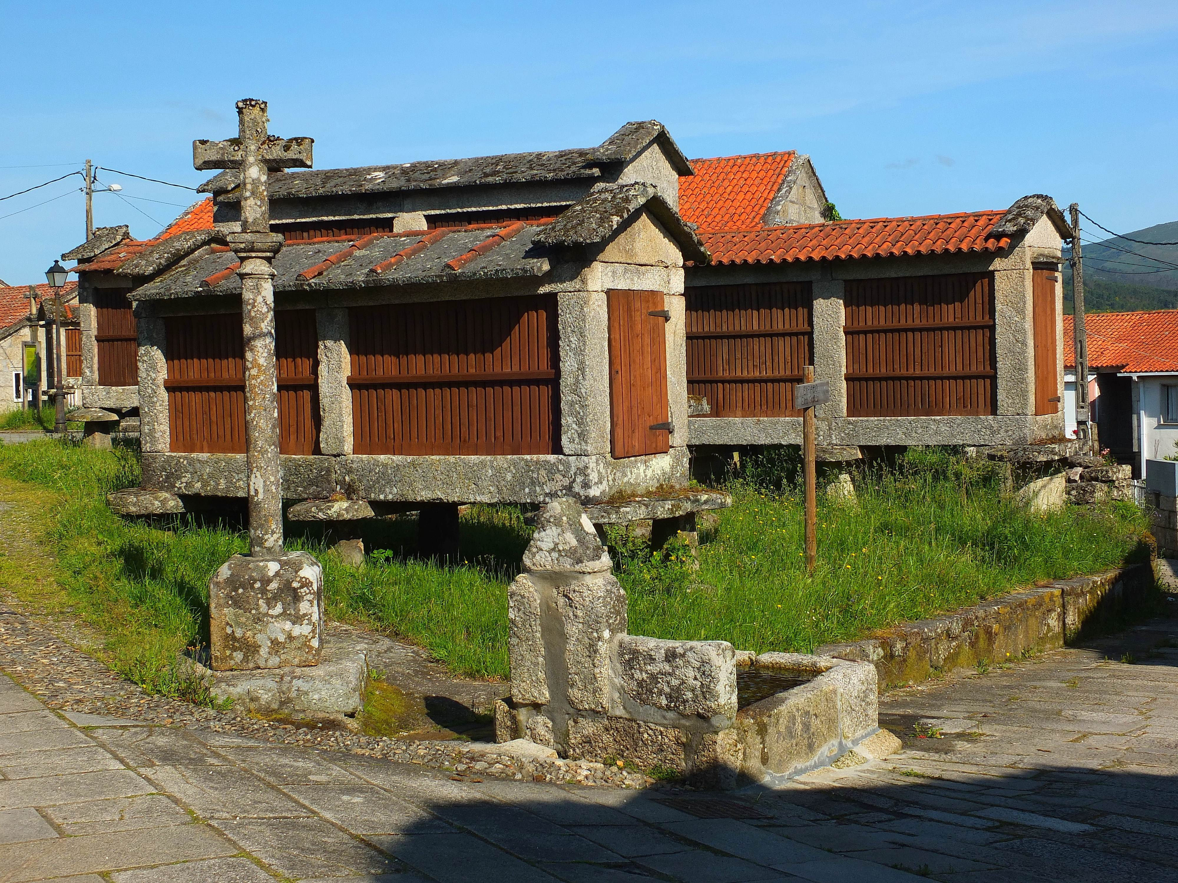 Cerdedo, Pontevedra, Galicia, España